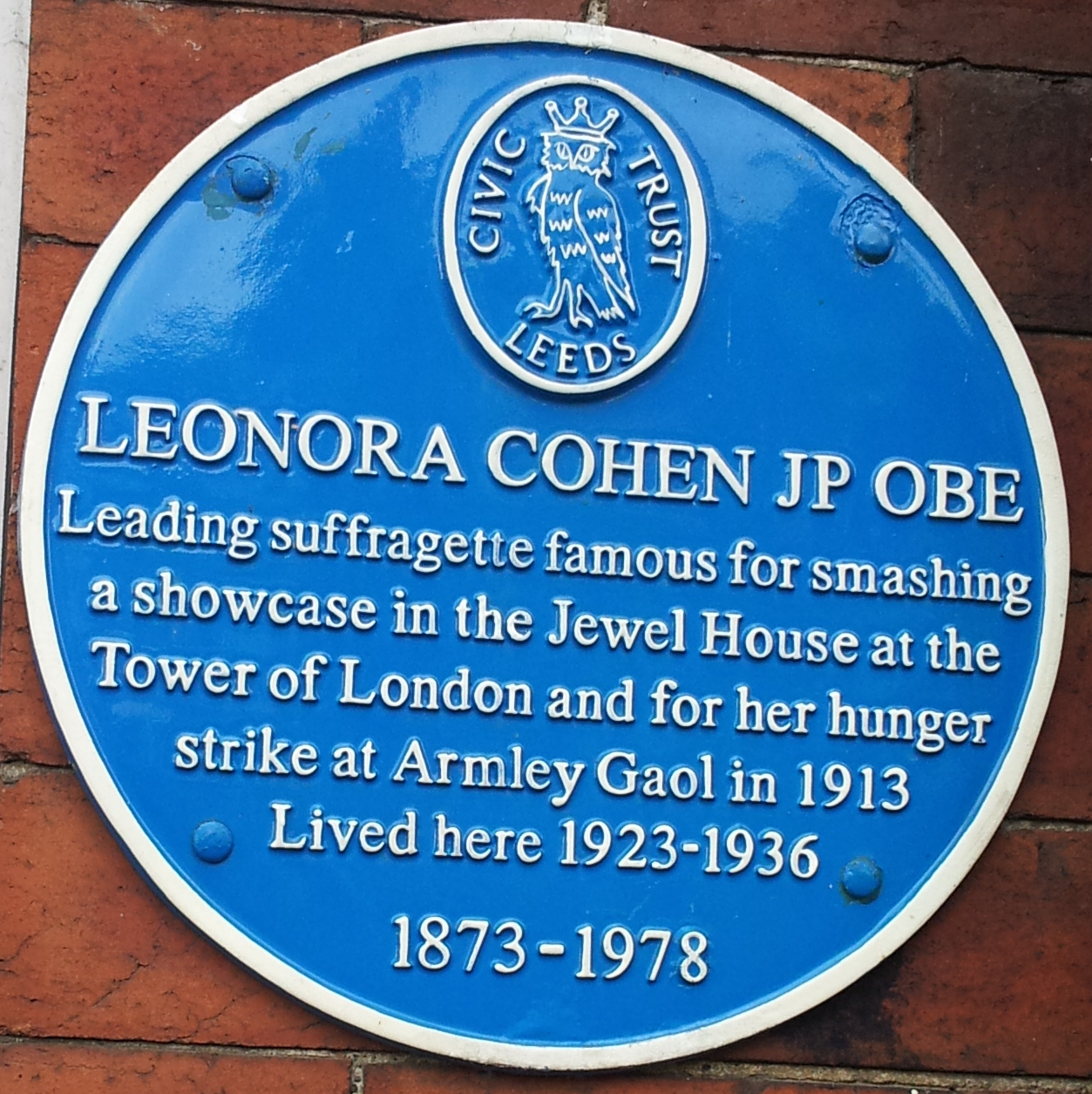 Blue Plaque à Leeds, domicile de la suffragette Leonora Cohen de 1923 à 1936